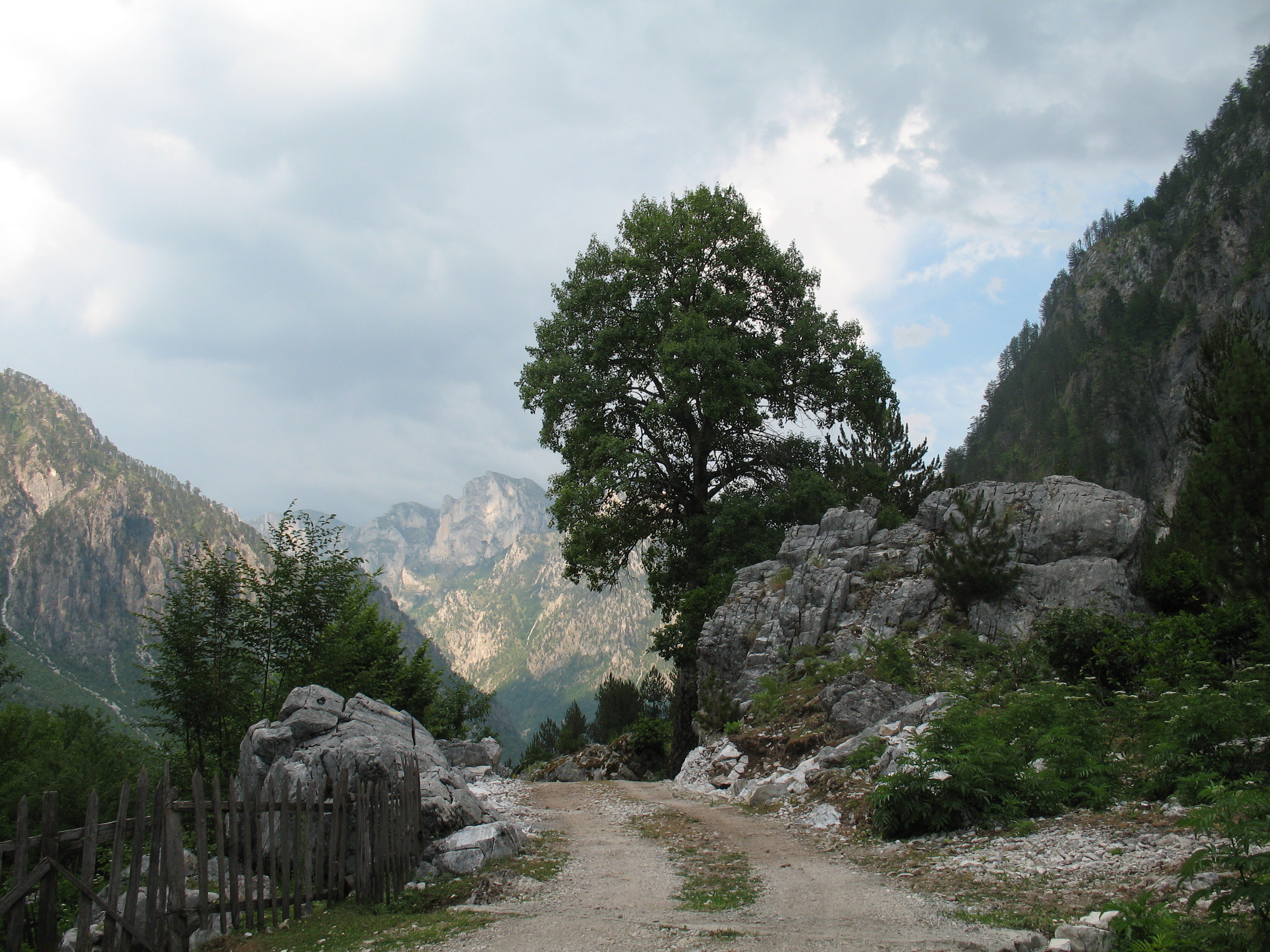 Valbona Valley, Albania, 2012